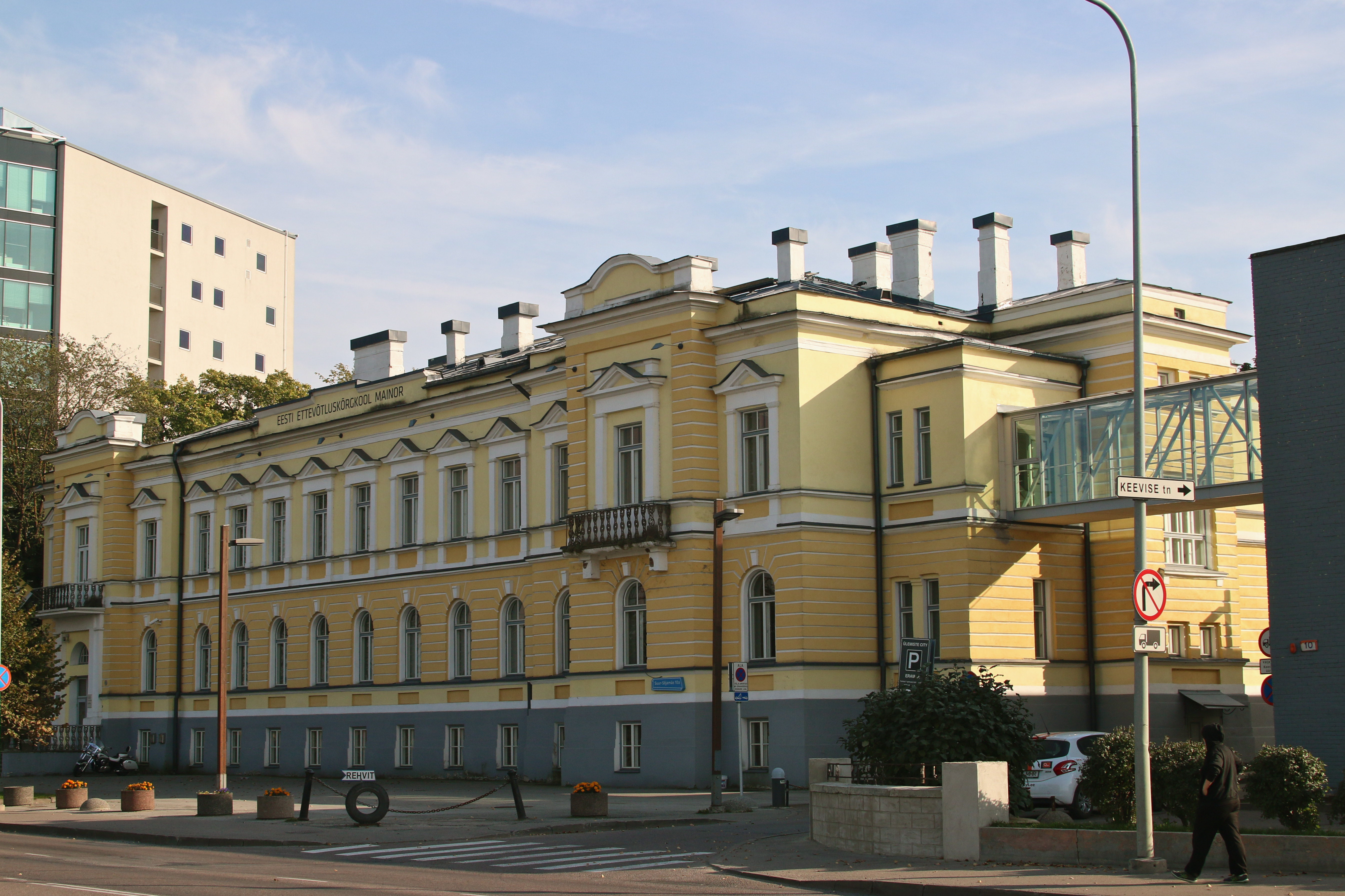 Kultuurimälestis 8562